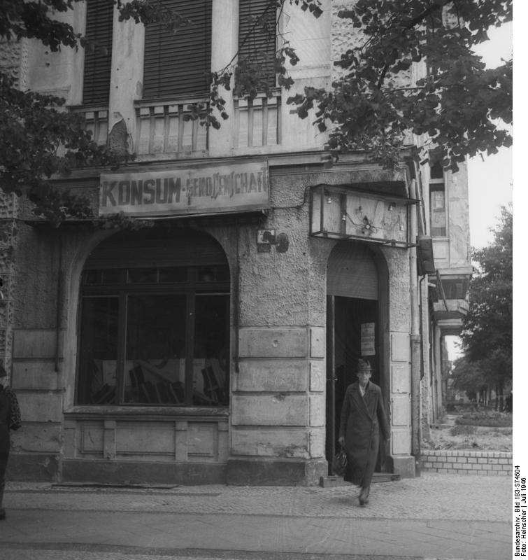 Berlin, Neues Konsumgeschäft Neueröffnete Berliner Konsumgeschäfte Aufn. Illus-Heinscher Juli 46 258-46 [Berlin.- Neu eröffnetes Geschäft der Konsum Genossenschaft]